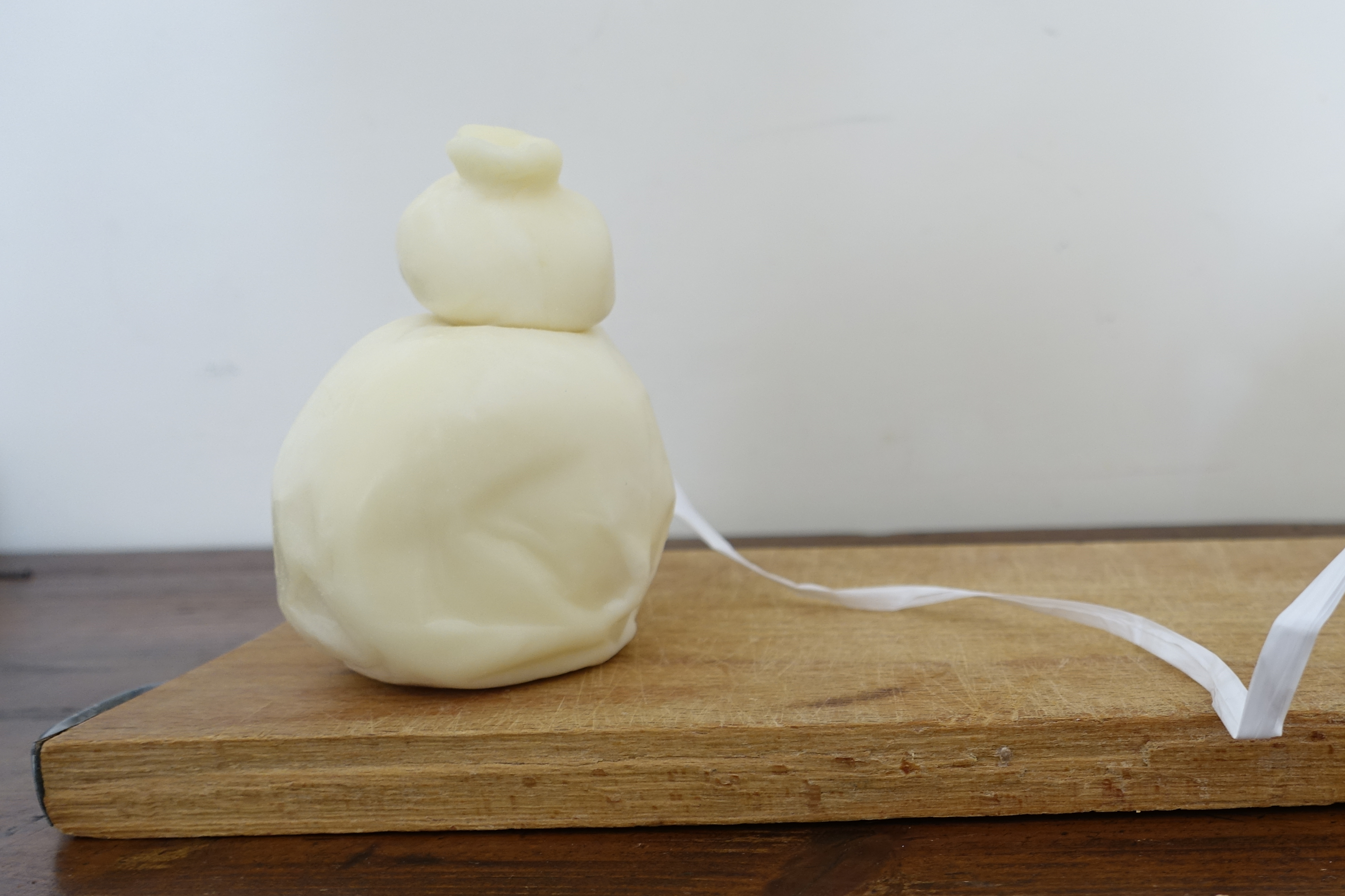 Scamorza bianca